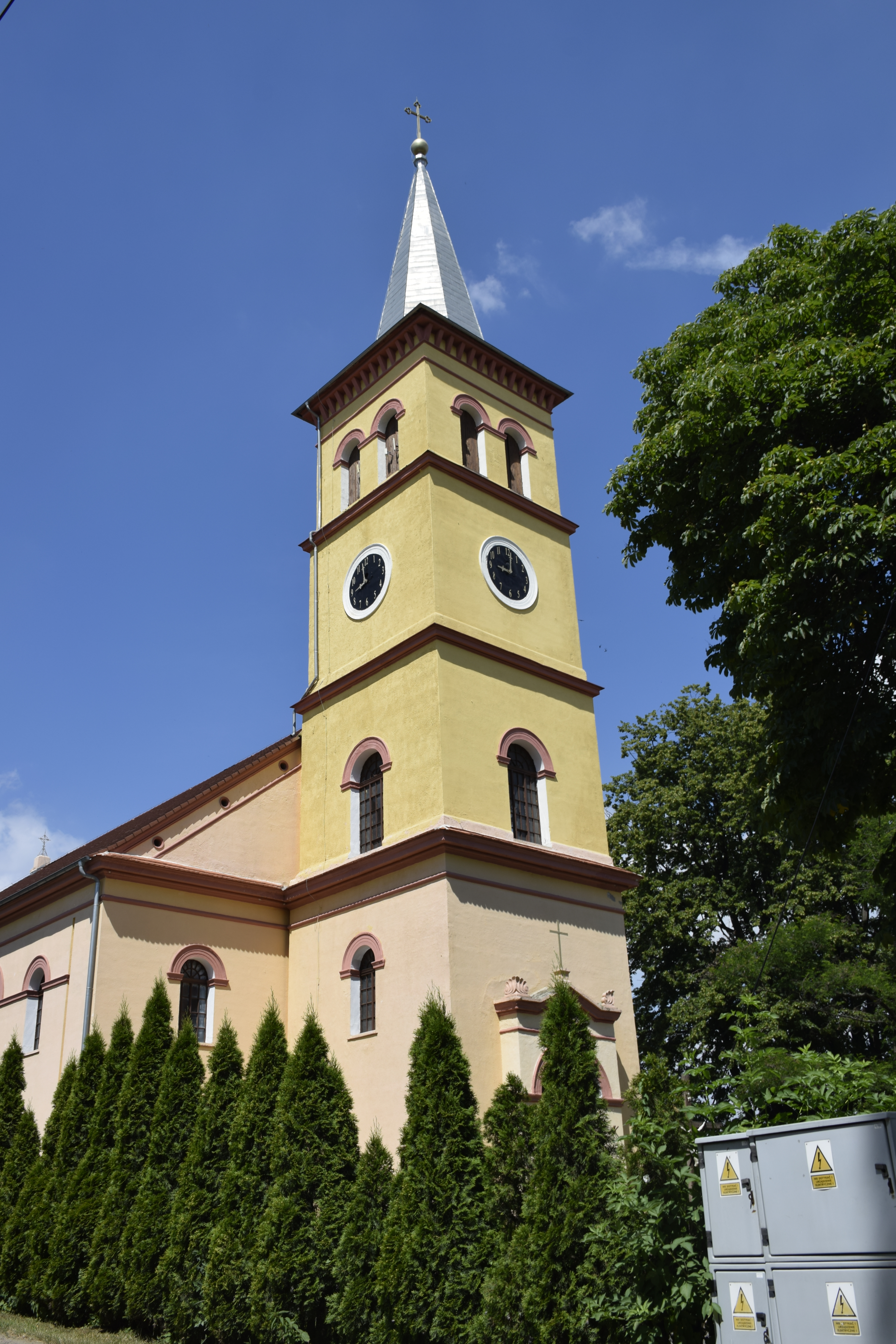 Wierzchosławice (województwo dolnośląskie). Polska.